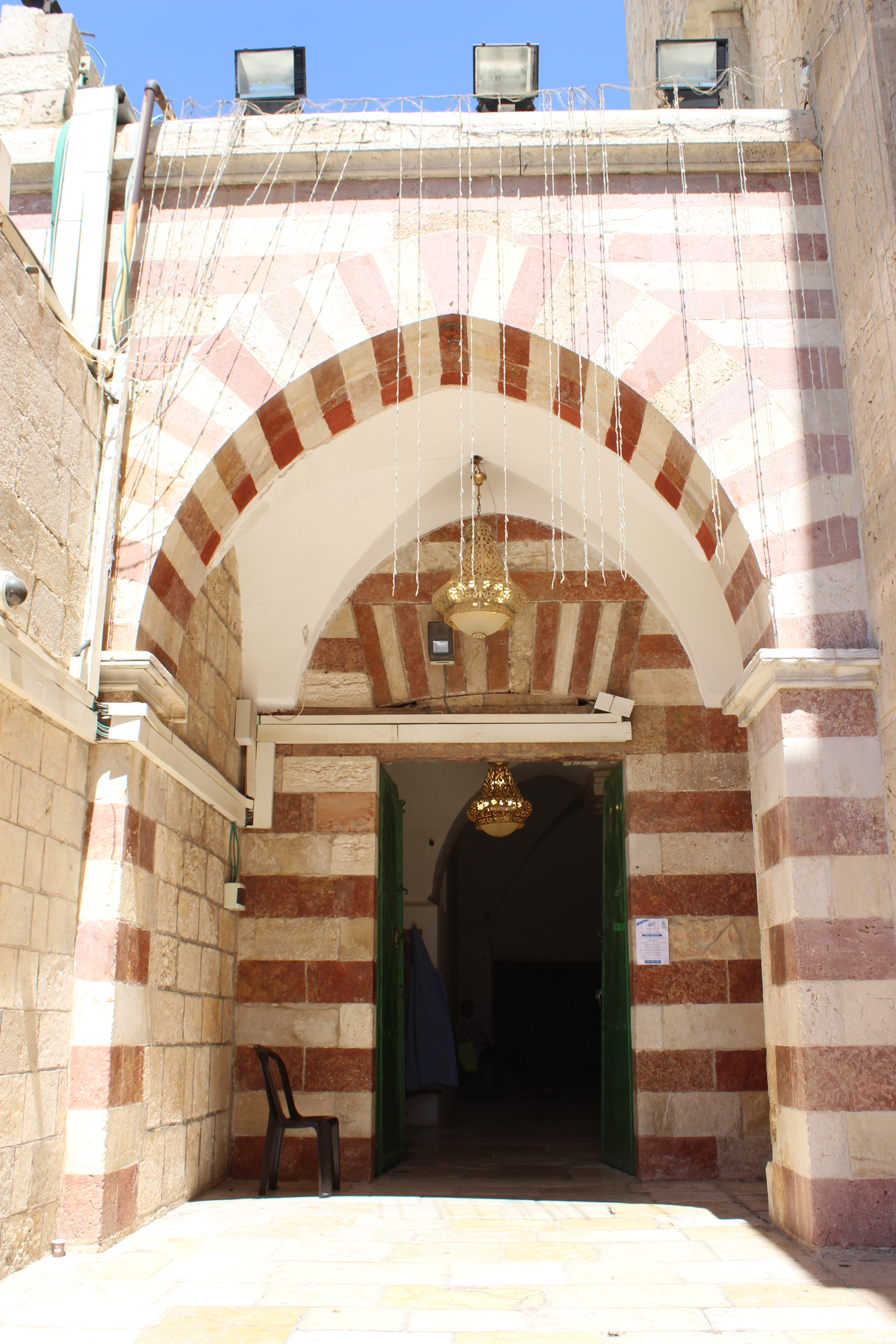 مدخل المسجد الابراهيمي الشمالي